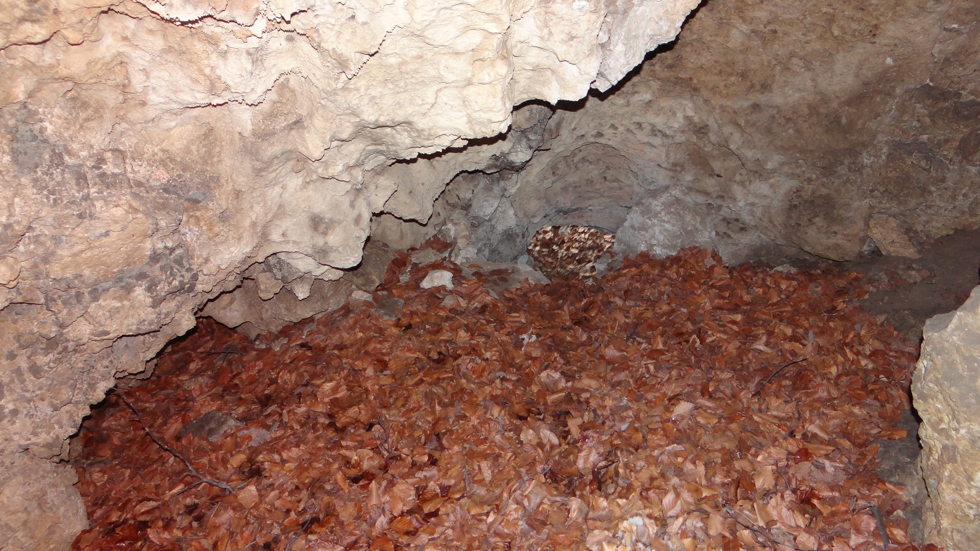 Jaskinia w Ostryszni w skale Cieplarnia w Wąwozie Ostryszni